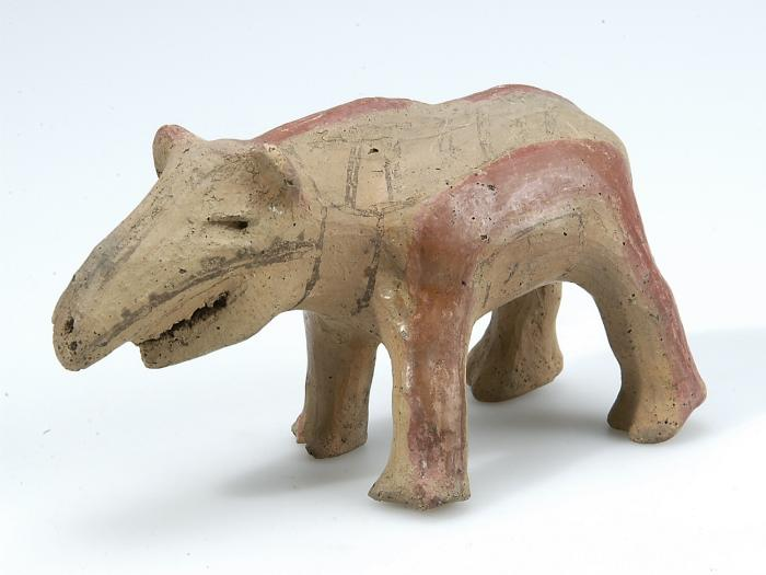 Beeld. Aardewerken tapir